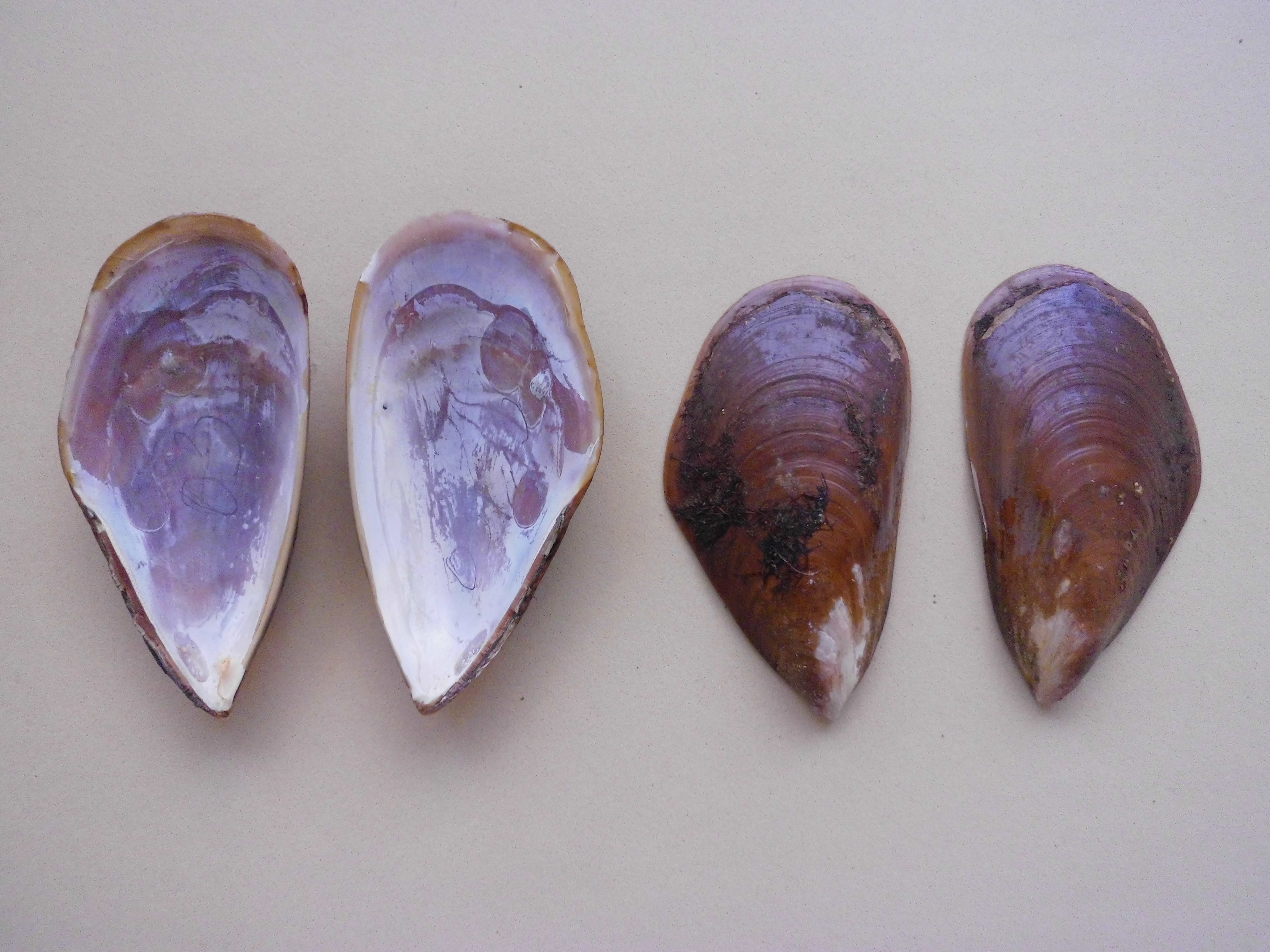 Perna perna (Linnaeus, 1758) colectados en guas del Golfo de Paria estado Sucre - Venezuela